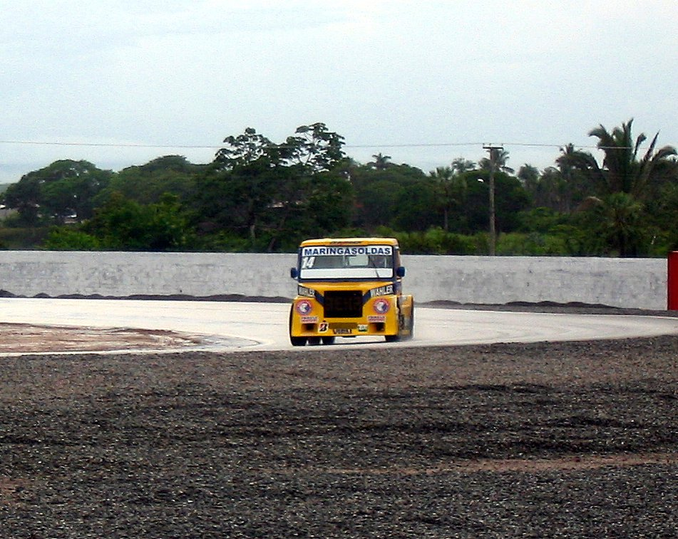 Caminhão Scania do piloto de Fórmula Truck João Marcos Maistro no treino da prova do Eusébio de 2006.